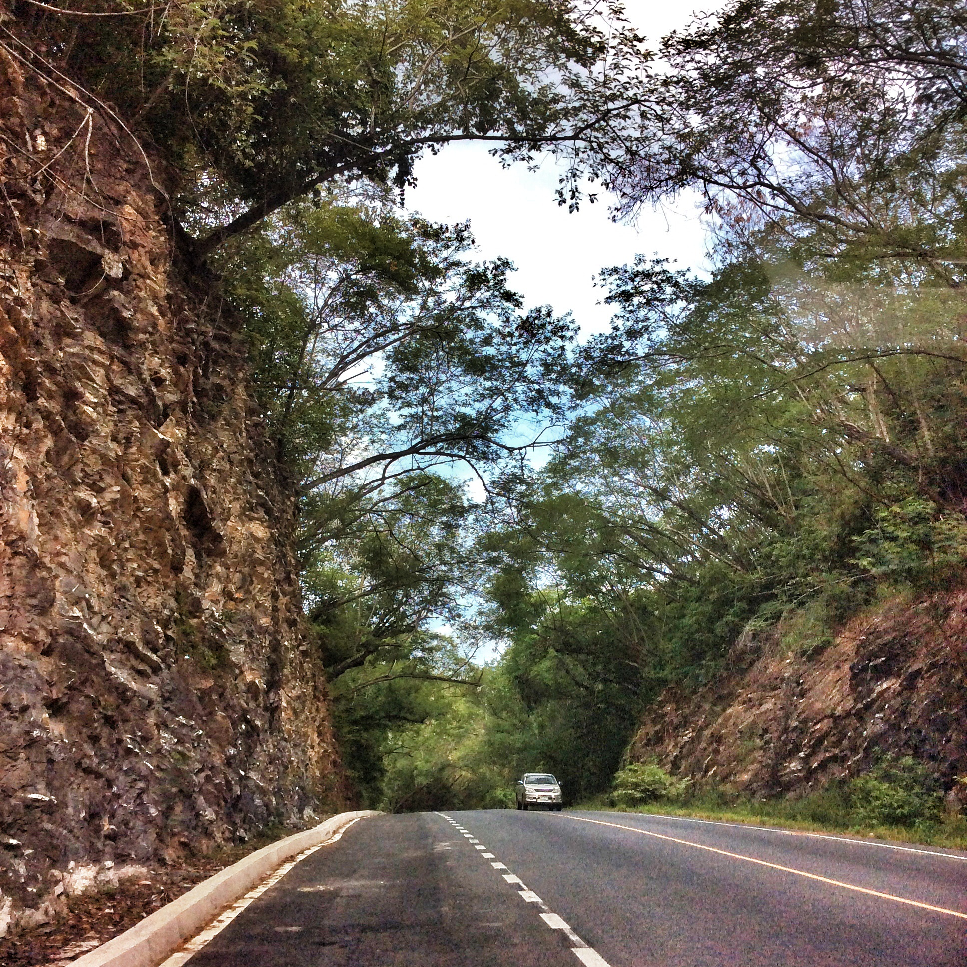 อุโมงค์ต้นไม้ ตำบล แสลงพัน จังหวัด สระบุรี ประเทศไทย